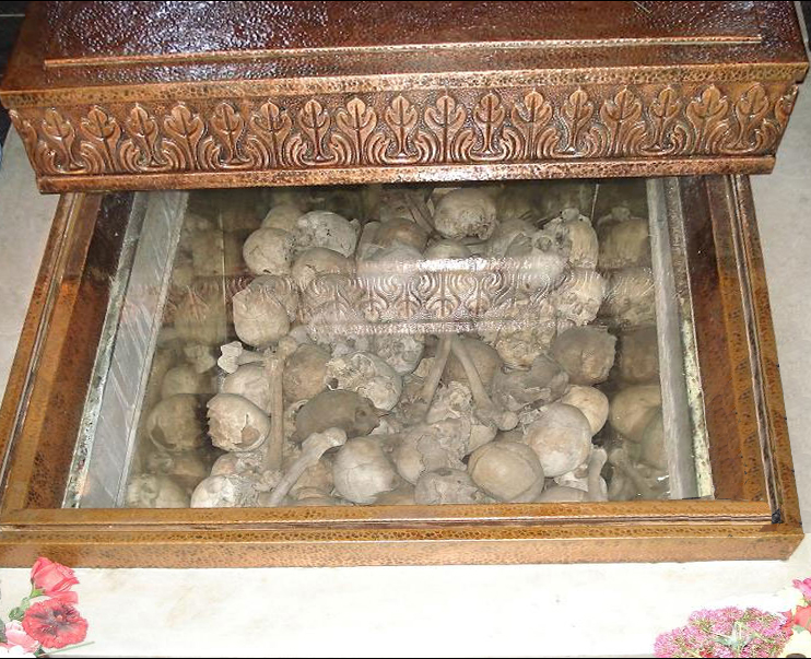 г. Батак, костницата в старата черква св. Неделя